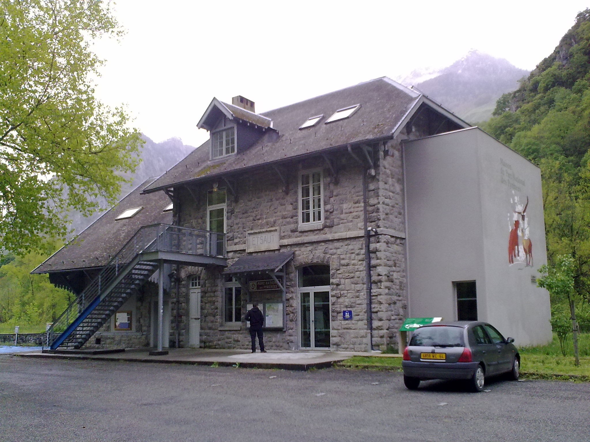 Etsaut, France